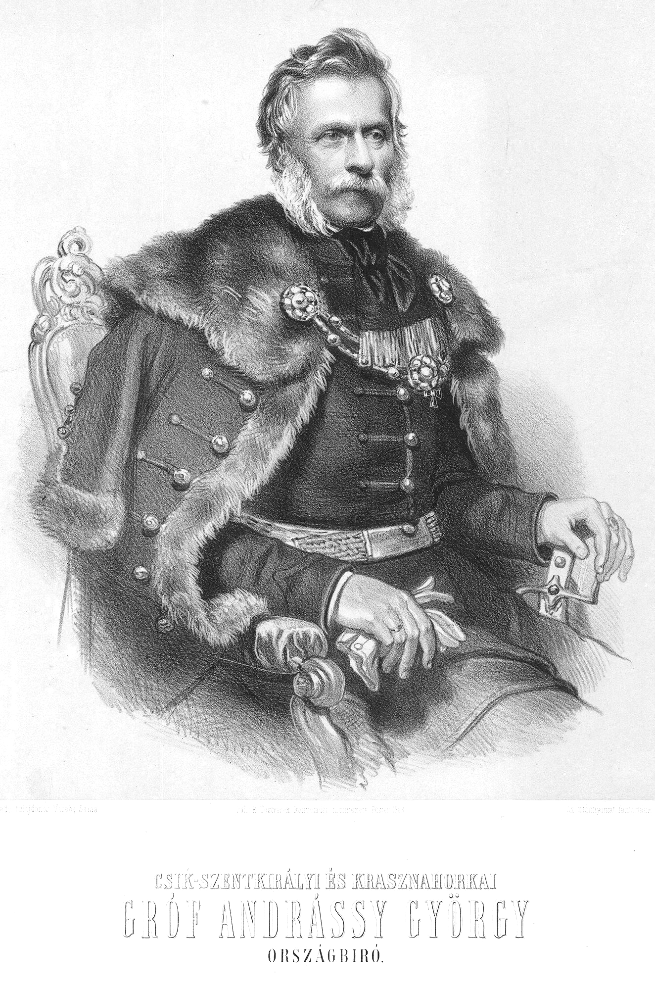 Krasznahorkai és csíkszentkirályi gróf Andrássy György (Kassa, 1797. február 5. – Bécs, 1872. december 19.) császári és királyi kamarás, valódi belső titkos tanácsos, Magyarország főpohárnokmestere, a Tiszai Vaspályatársaság és a Felső-magyarországi Bányamívelő Egyesület elnöke, a Magyar Tudományos Akadémia tagja.